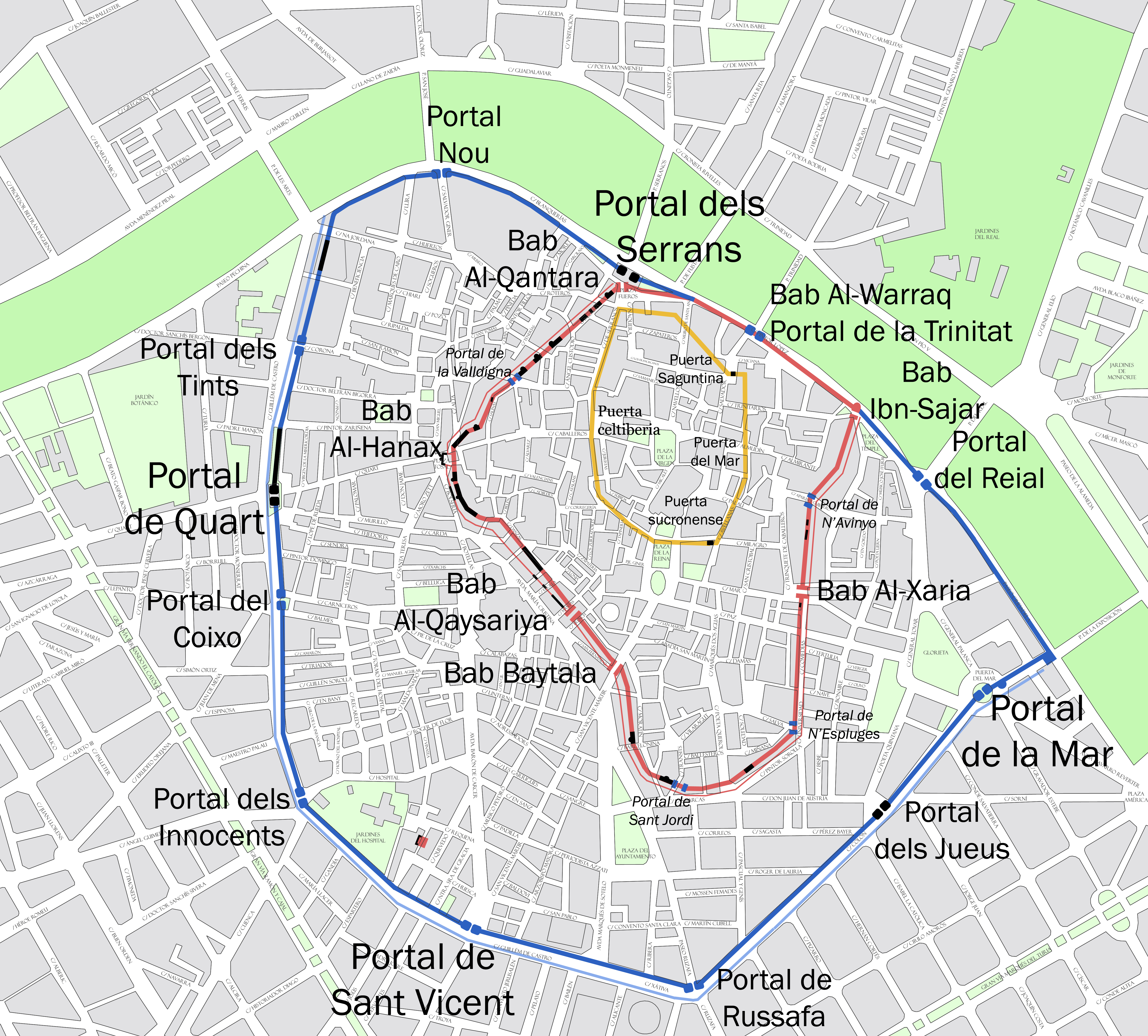 Situación aproximada de las murallas cristiana, árabe y romana de la ciudad de Valencia en el callejero actual. En color amarillo la muralla romana con un trazado aproximado por ser menos conocidas. Se indica la situación supuesta de las cuatro puertas así como los nombres utilizados por la historiografía moderna. En negro los tramos observables en la actualidad situados en la Calle Salvador y en la Calle Avellanas. En rojo la muralla árabe con la situación y nombre de sus puertas principales. Se indica también la presencia de torres y barbacana. En negro los restos visibles en la actualidad, los tramos de muralla del barrio del Carmen y el tramo situado bajo un edificio de la Calle del Almirante. En azul se indica la muralla cristiana con los portales mayores (Serrans, Quart, Sant Vicent y de la Mar), los portales menores y en cursiva los portillos abiertos durante este periodo en la muralla árabe. En negro los restos conservados en la actualidad, el Portal dels Serrans, el Portal de Quart y su lienzo de muralla y el Portal dels Jueus en la Plaza de Colón.